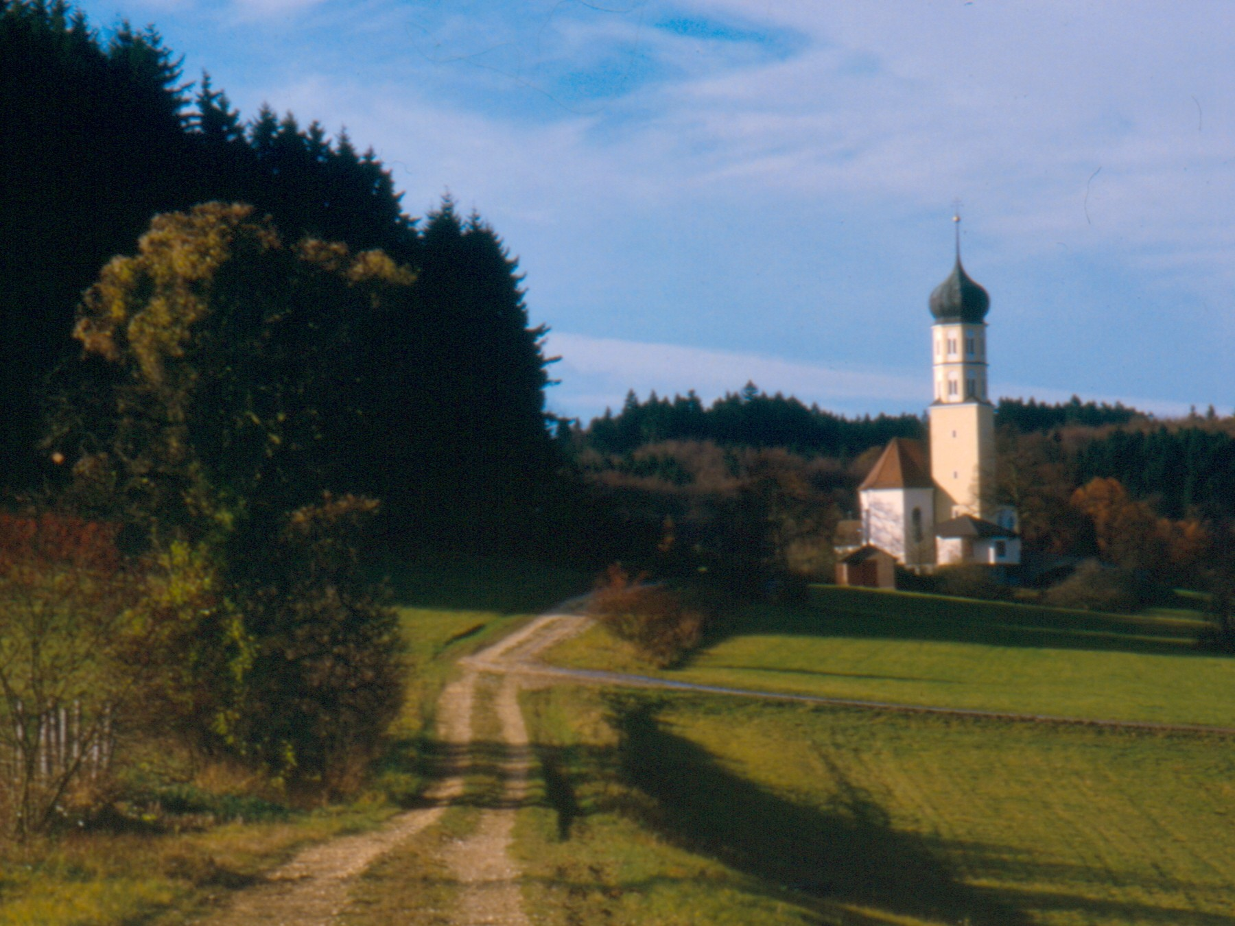 St. Georgskirche Auernheim, 1985